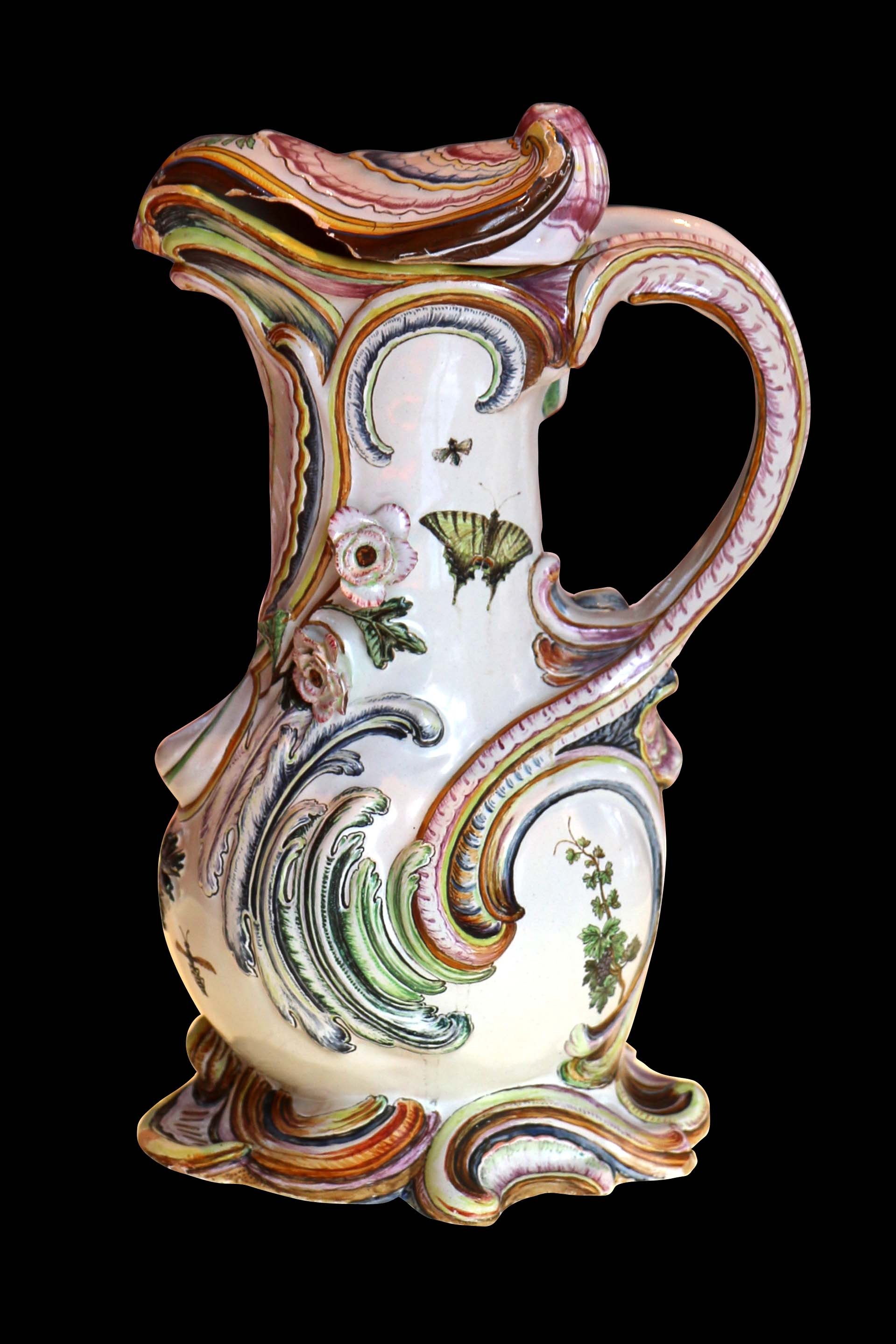 Musée de la faïence à Marseille, atelier de Gaspard Robert. Aiguière avec couvercle, décor petit feu polychrome, vers 1750. Aiguière en forme de rocaille à motifs de rinceaux et d'entrelacs en relief. Décor composé de fleurs, tiges feuillées et pampres animés d'insectes peints. Cette aiguière est maintenant présentée depuis juin 2012 dans le nouveau musée des Arts décoratifs, de la Faïence et de la Mode au château Borély à Marseille.